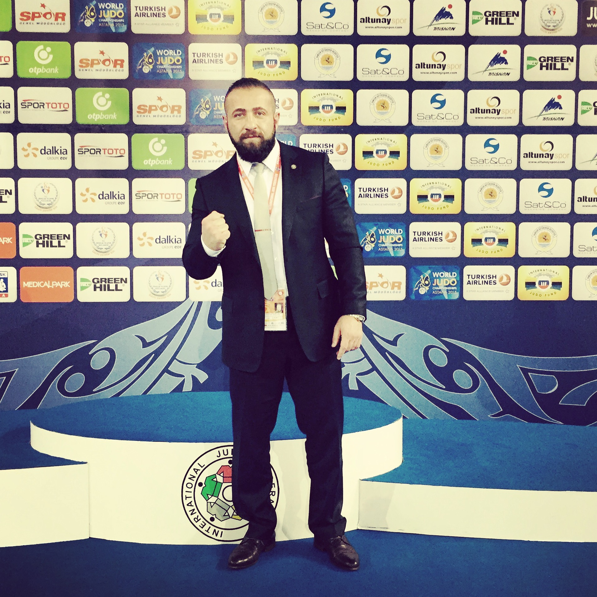 Samsun / Türkei Judo Grand Prix 2015